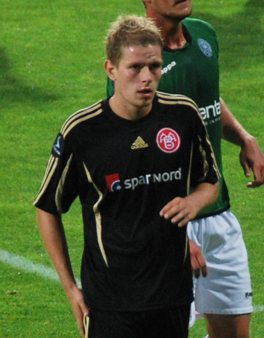 Fodboldspilleren Mathias Wichmann fra AaB. Her i pokalkampen imellem Viborg FF og AaB på Viborg Stadion.